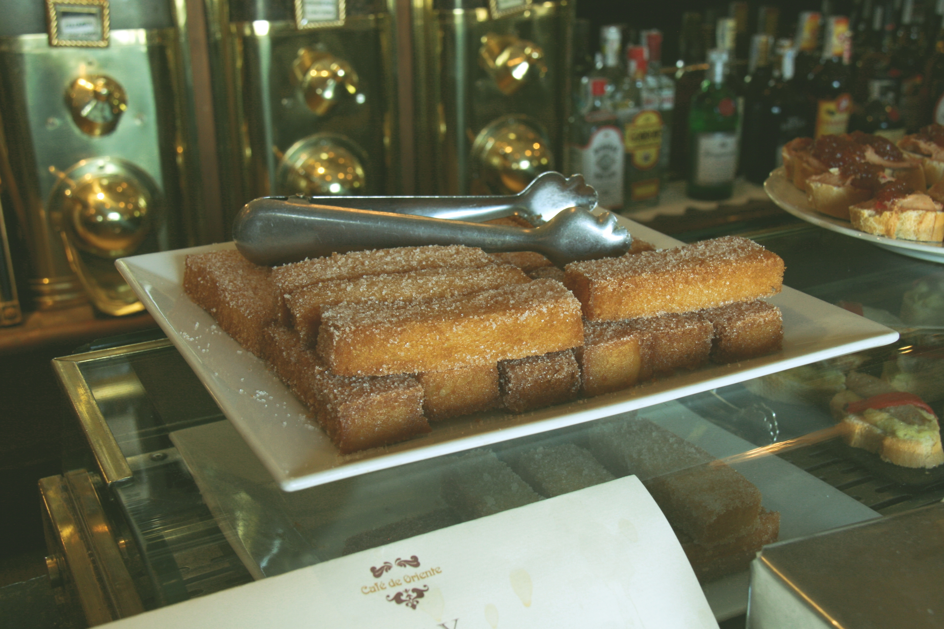 Picatostes en el "Café de Oriente" - Madrid